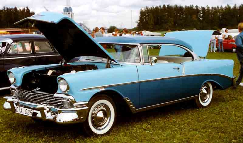 1956 Chevrolet Two-Ten Series 2100B, Model 2154 2-door Hardtop